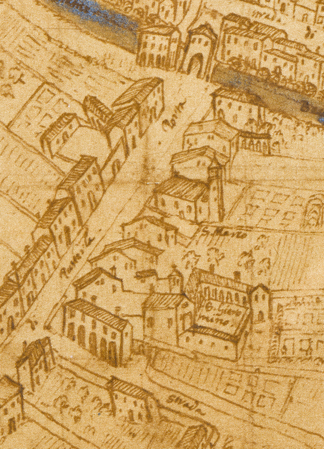 Vicenza - Pianta Angelica 1580 - particolare del Borgo Pusterla - Chiese di San Marco e San Girolamo dei Gesuati